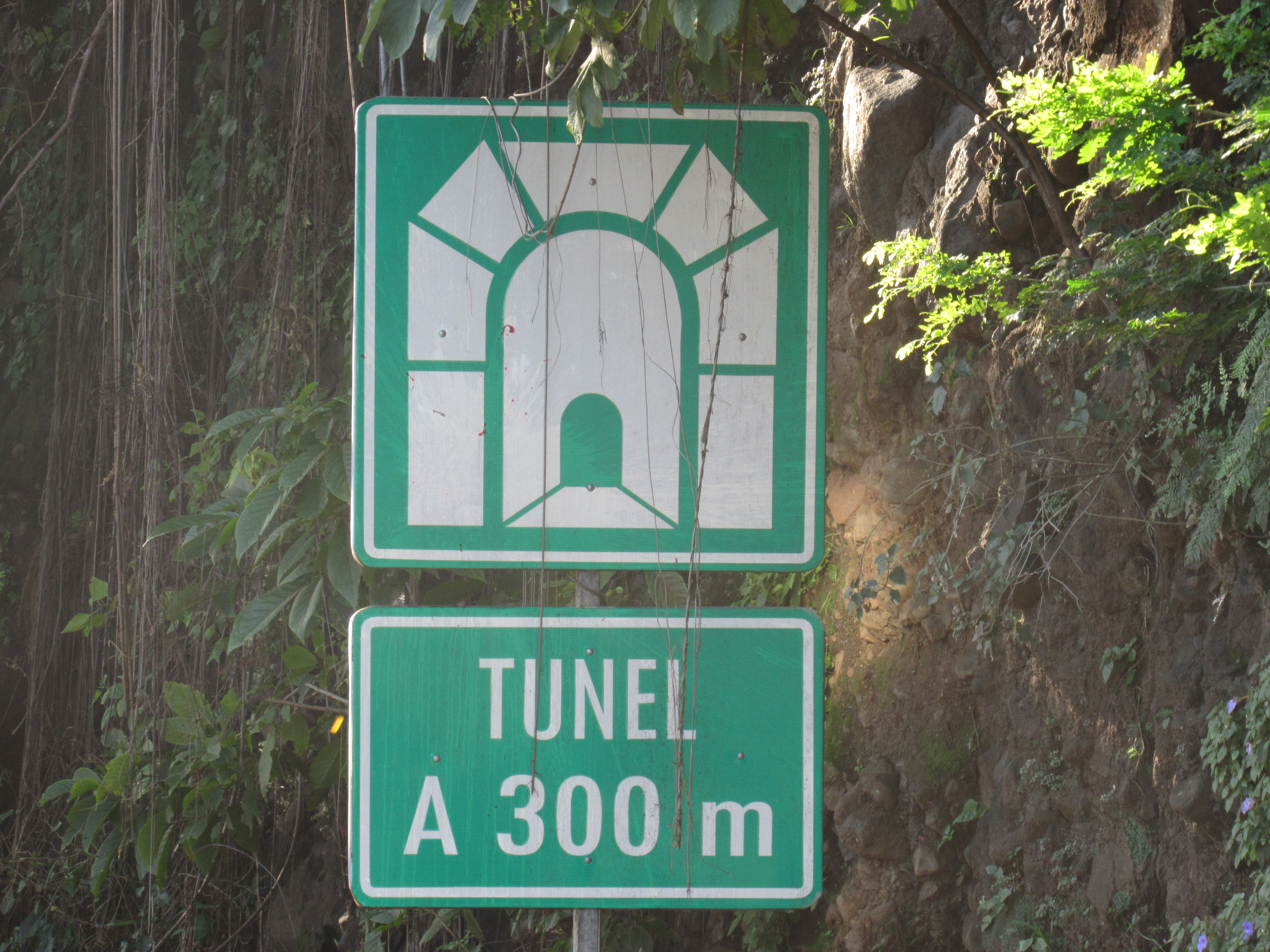 Imagen de túnel